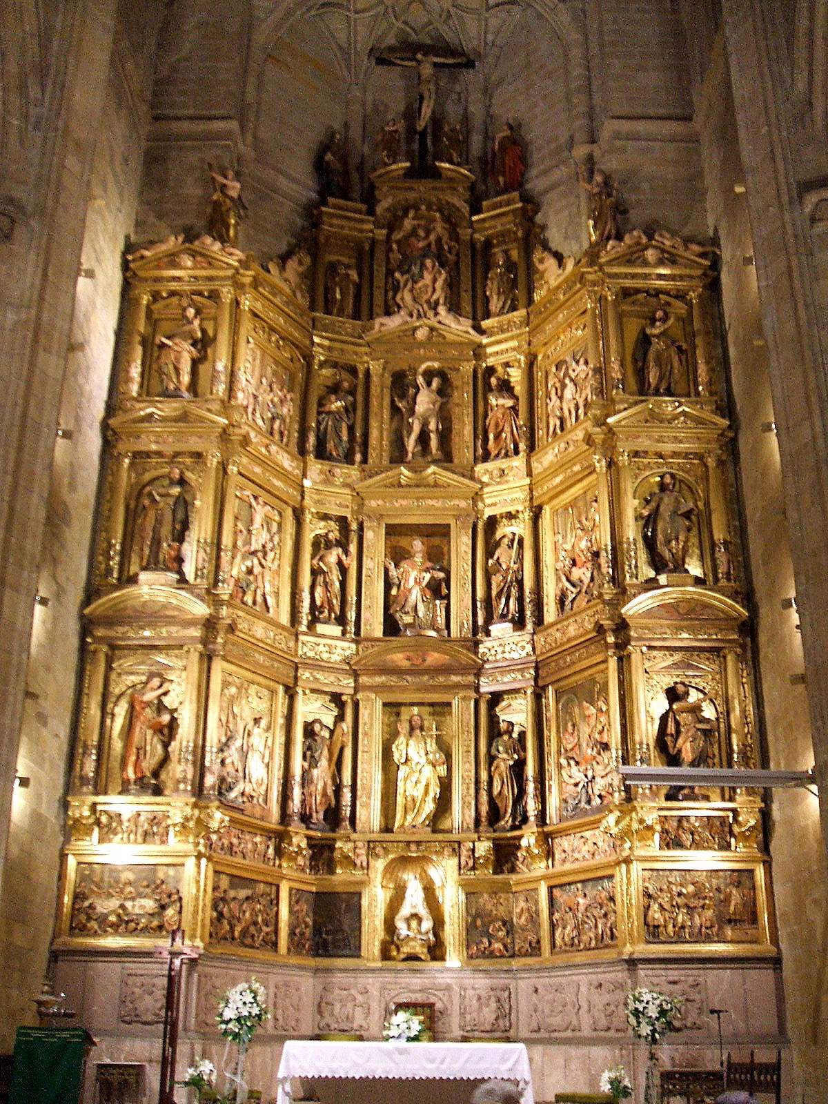 San Sebastián - Iglesia de San Vicente Mártir, retablo mayor romanista